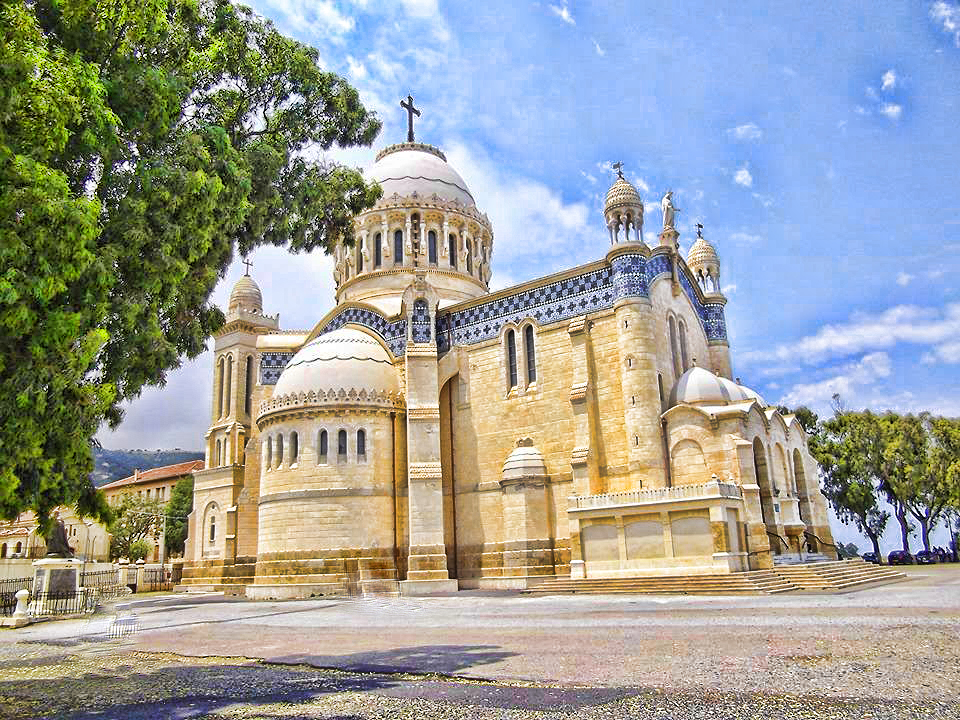 هي كاتدرائية كاثوليكية تقع في العاصمة الجزائرية،